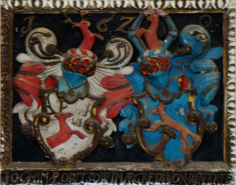 Allianzwapen 1620 in der Dorfkirche Levitzow